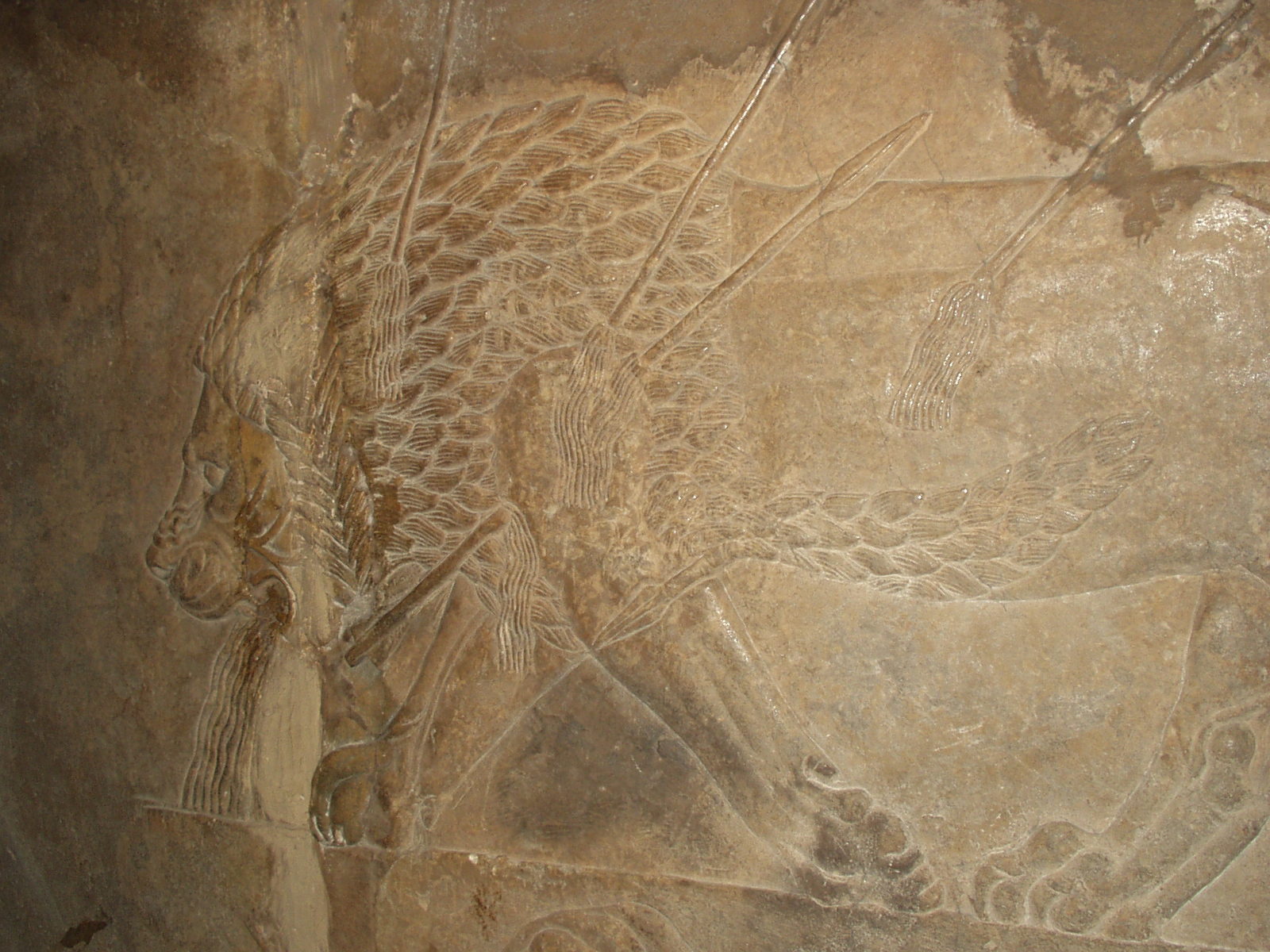 eigen foto Britisch Museum 2003 basreliëf met leeuw afkomstig uit Irak